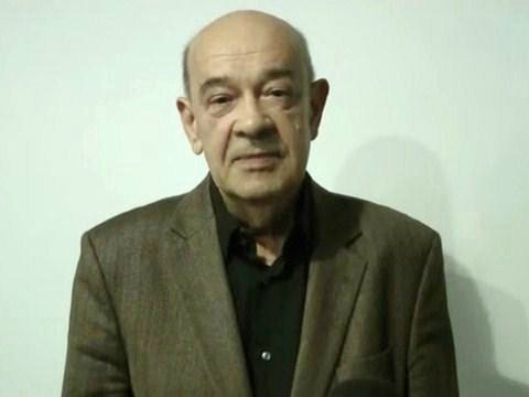 Antoni Krauze, reżyser filmowy.